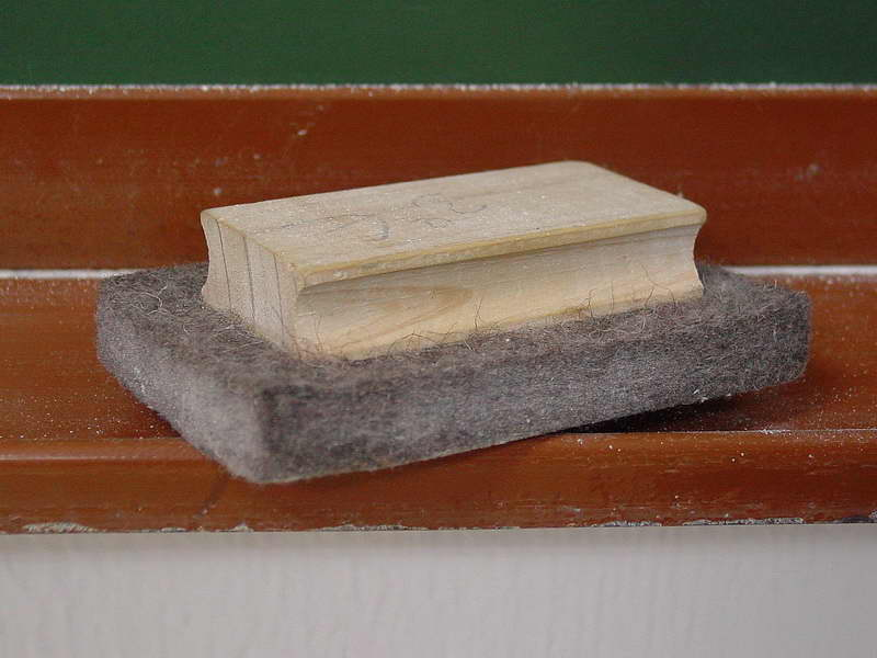 Borrador dun taboleiro